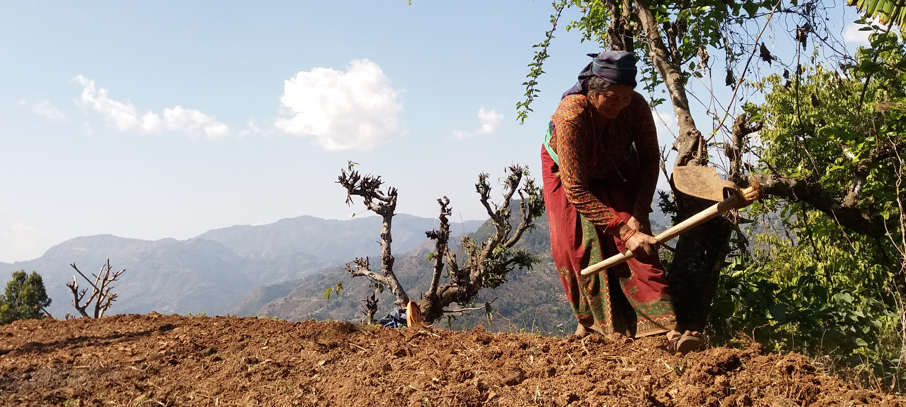 नेपाली: कोदालीले बारी खन्दै एक नेपाली महिला